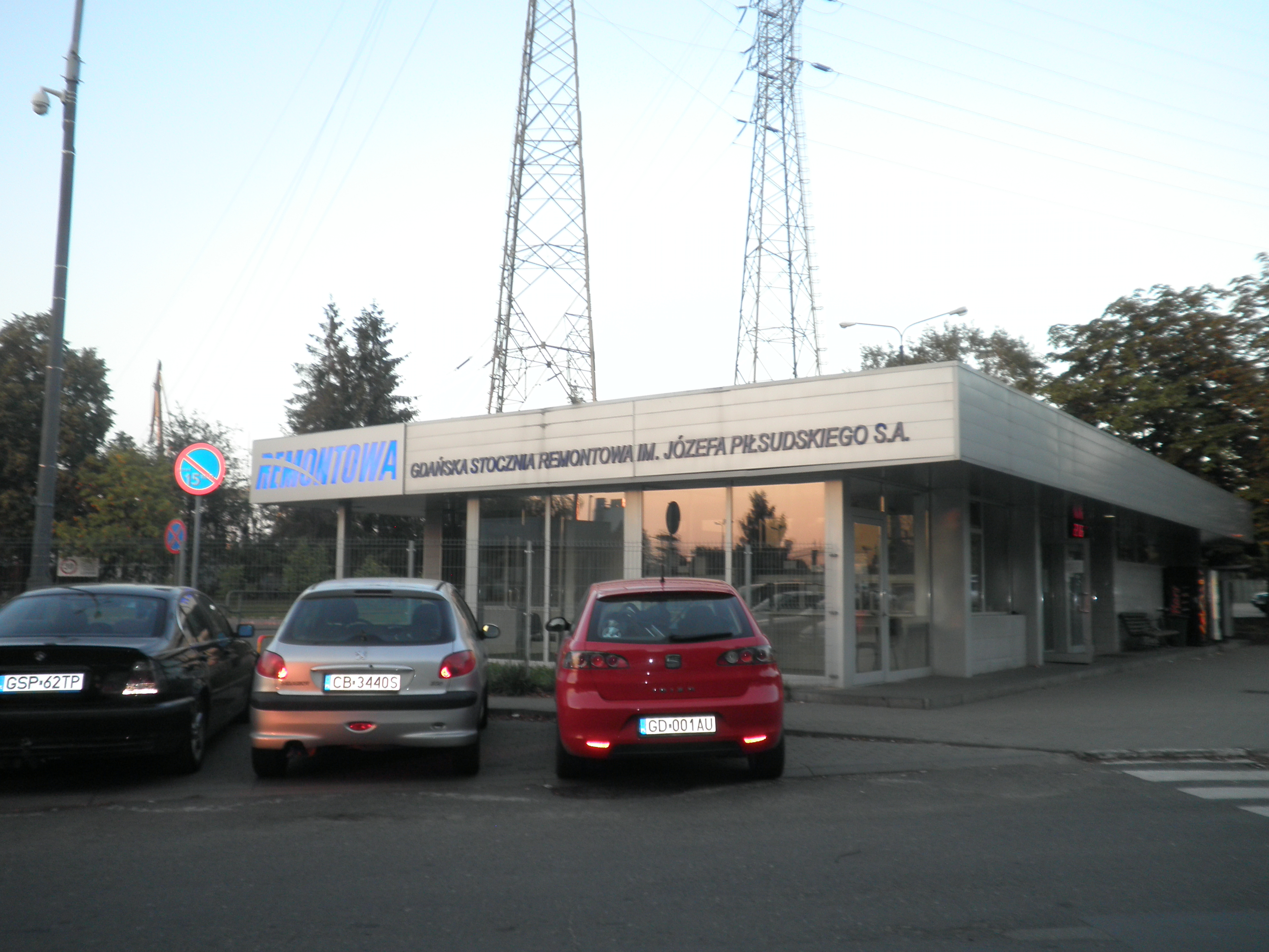 Remontowa Shiprepairyard, ul. Na Ostrowiu 1. 80-958 Gdańsk, Polen.